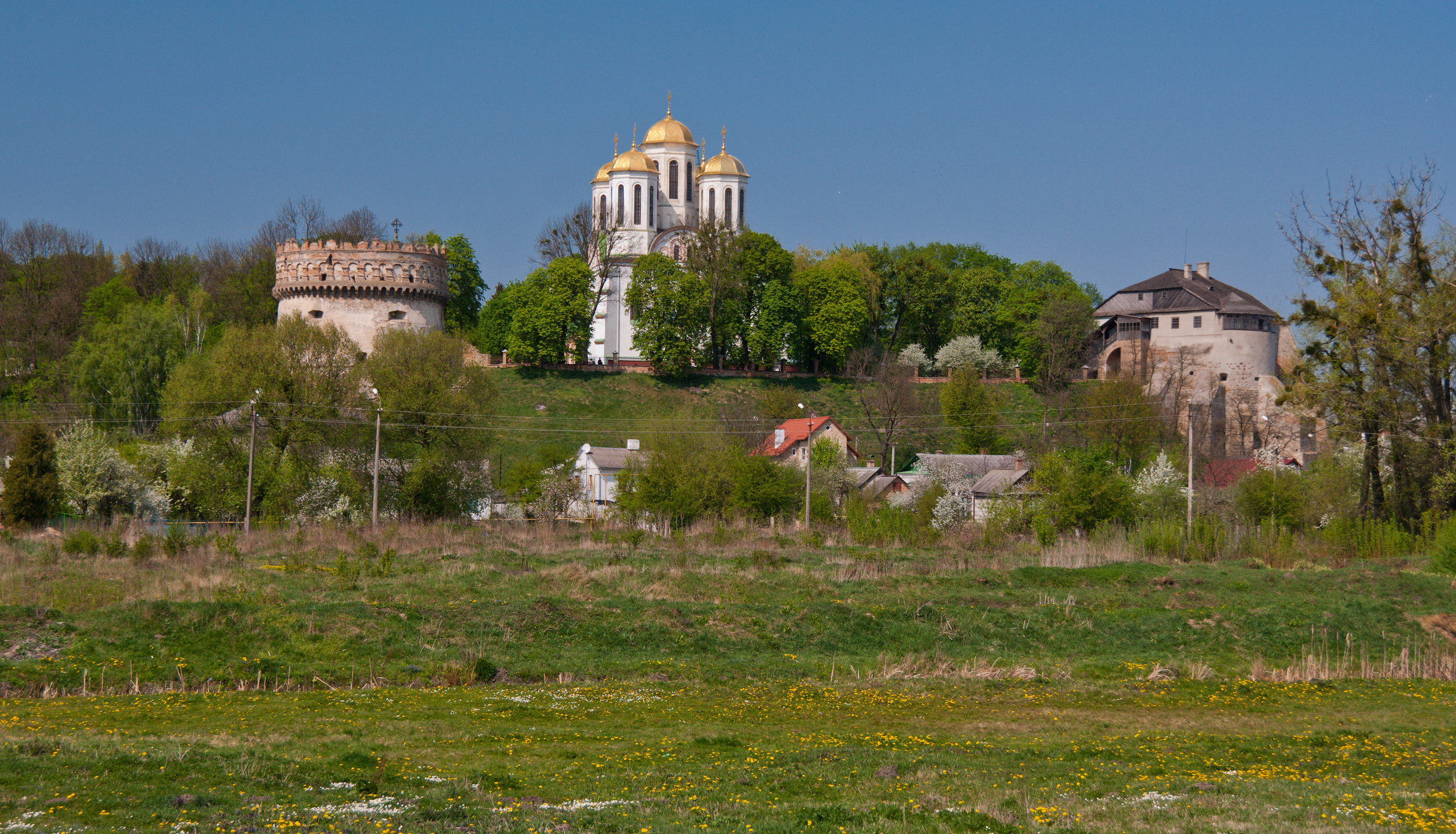 Замок князів Острозьких (XIV-XIX ст.) в місті Острог